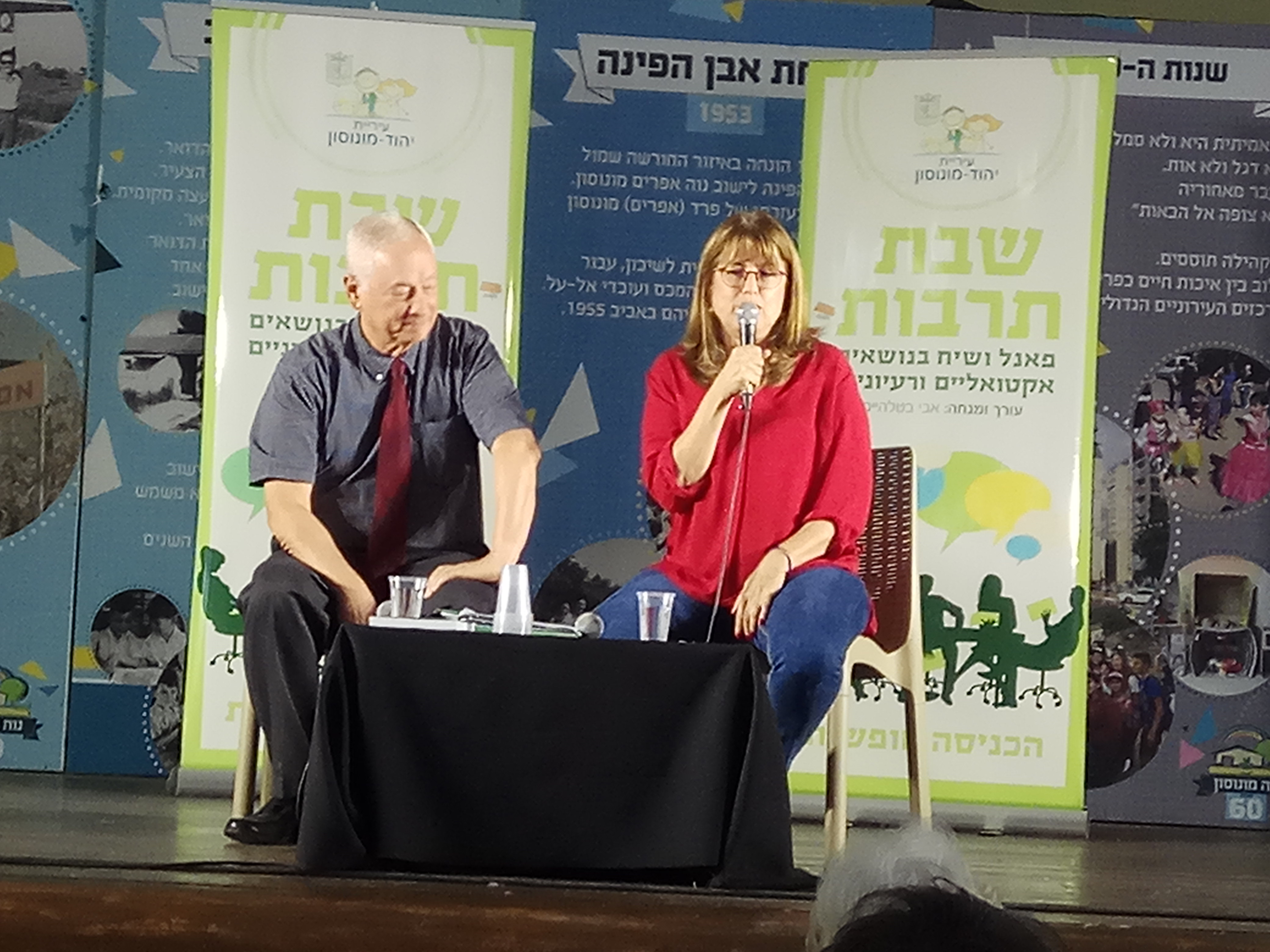 יעלה מכליס, ראש העיר יהוד -נווה מונוסון באירוע שבתרבות בנווה מונוסון עם אבי בטלהיים